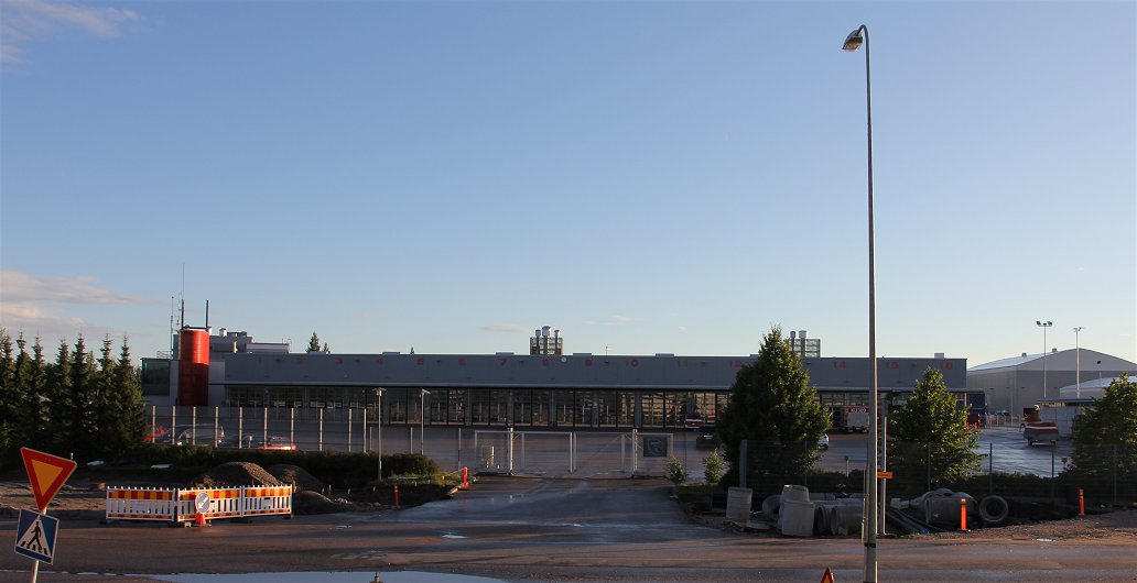 Keski-Uudenmaan pelastuslaitoksen pelastuskeskus ja hallinto sijaitsevat Vantaan Lentokentän kaupunginosassa; katuosoite on Teknikontie 4, 01530 Vantaa (vierailijat Mekaanikonkujan puolelta).